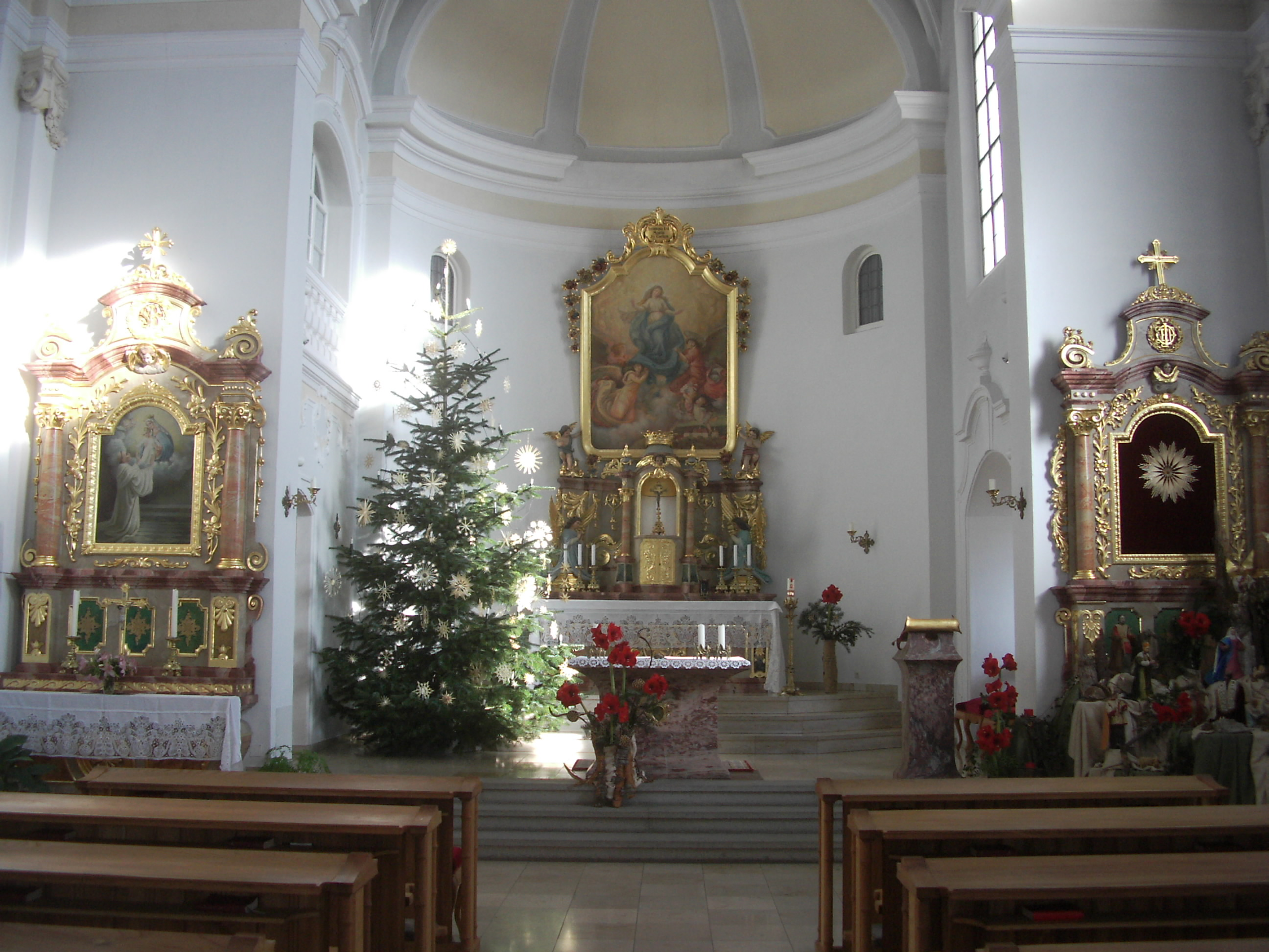 Iglesia del monasterio cisterciense Thyrnau